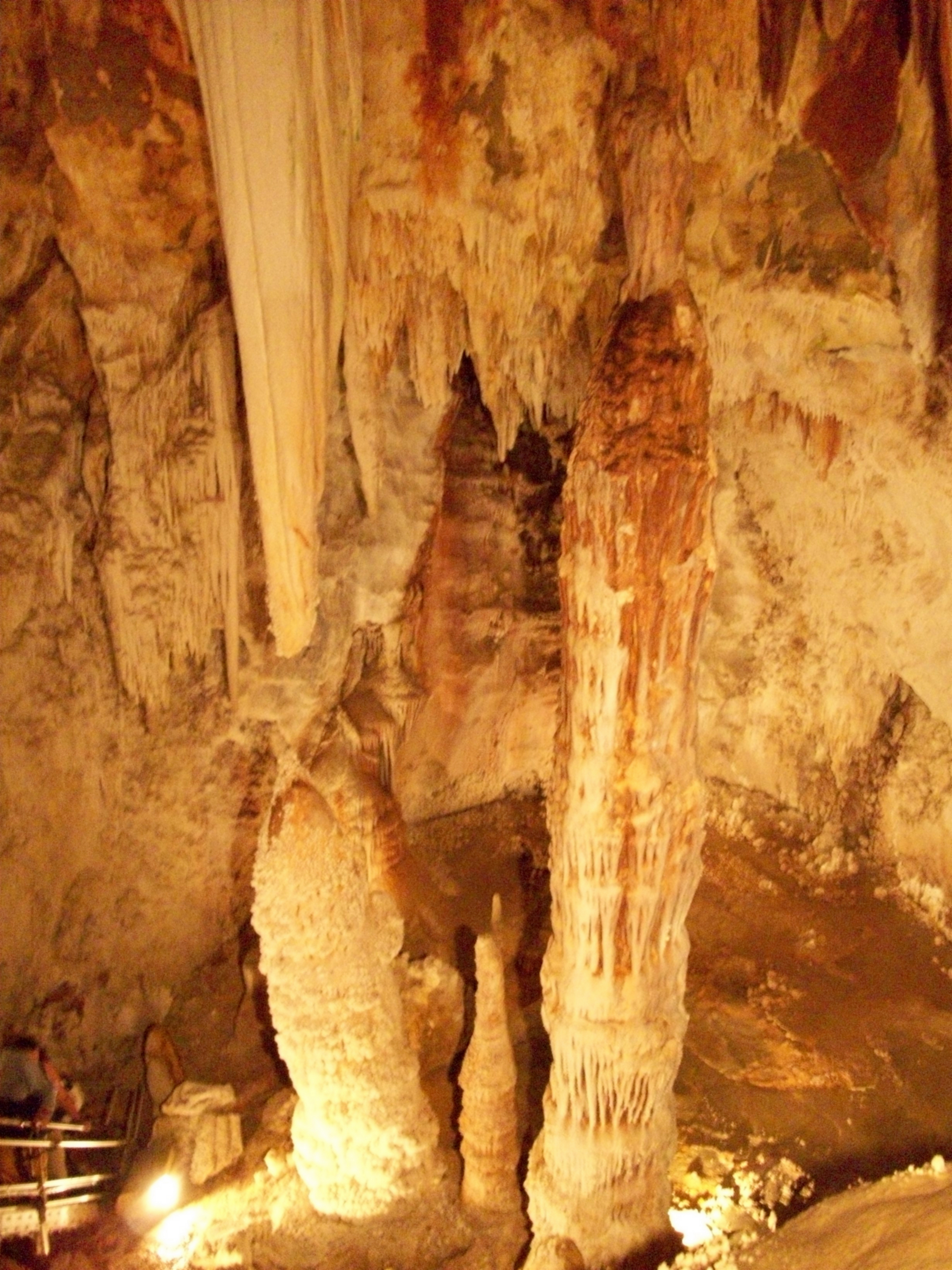 Der ca. 8 m hohe sogenannte Turm von Pisa-Stalagmit